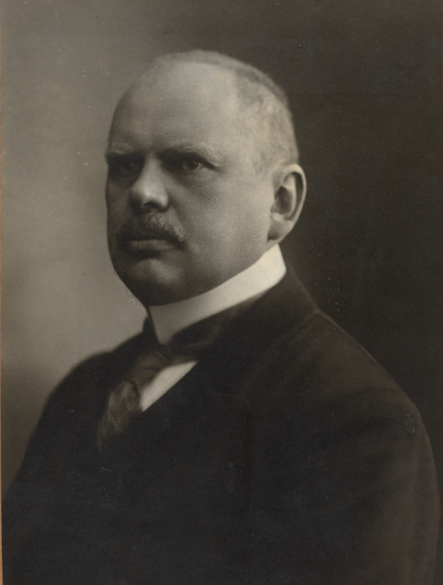 Max Hussarek von Heinlein (1865-1935) österr. Ministerpräsident